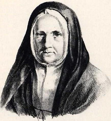 Portrait de Mère Pauline de Pinczon du Sel